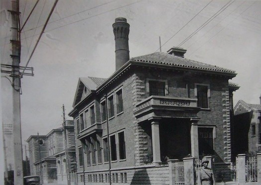 法国外交部赠送的十九世纪末至二十世纪初的天津法租界图片集